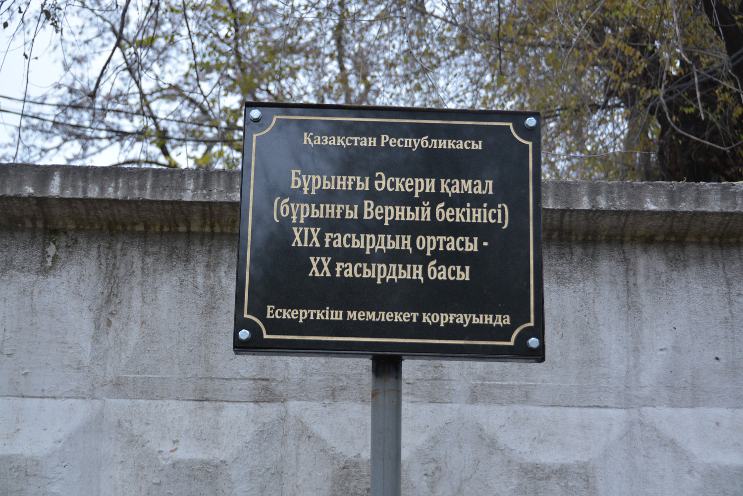 Охранная доска комплекса "Верненская крепость"